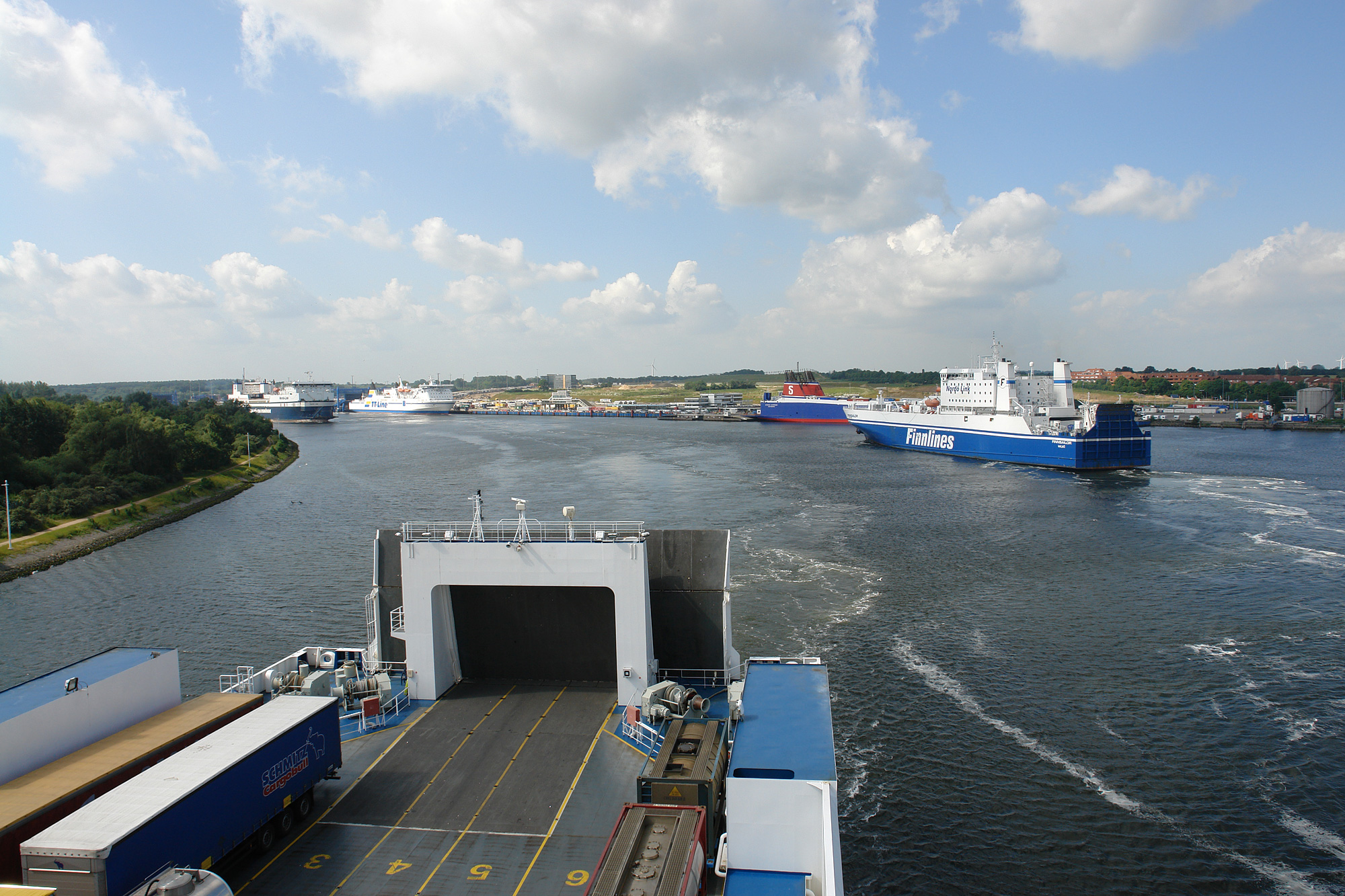 Fährhafen Travemünde